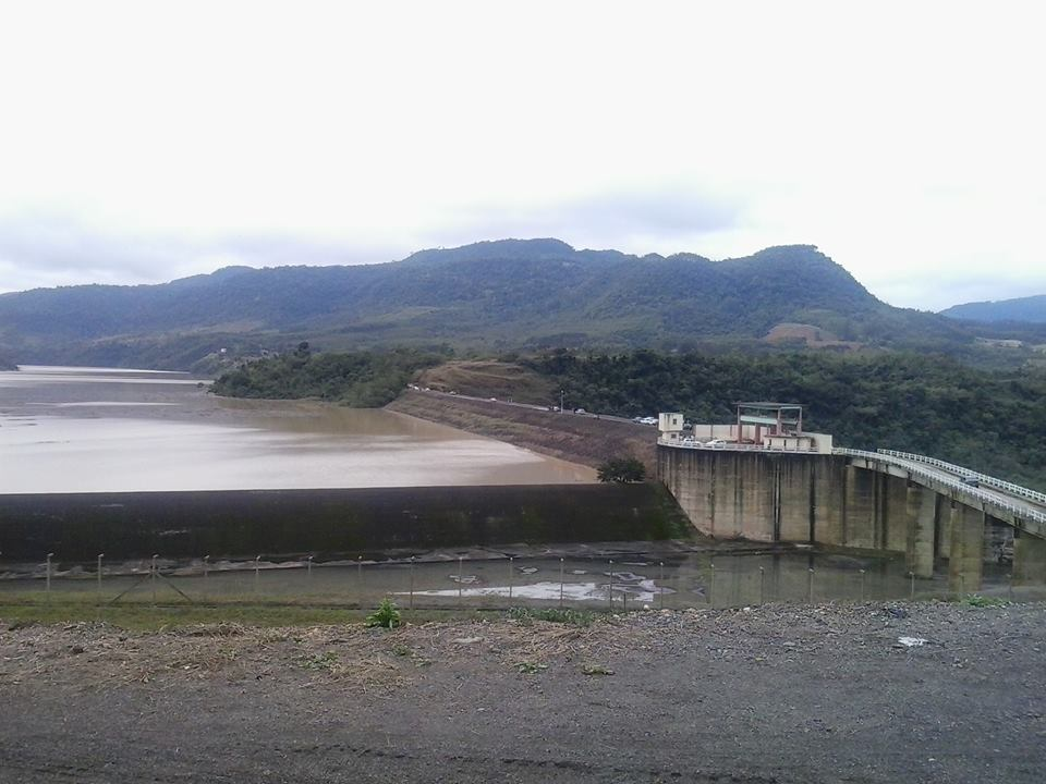 Barragem Norte- José Boiteux- Santa Catarina